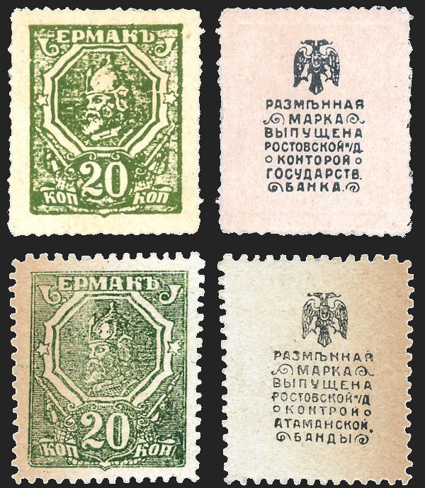 Propagandafälschung Russlands aus dem Jahr 1919 (unten) im Vergleich zur echten Marke der Kosaken-Armee aus dem Jahr 1918 (oben).